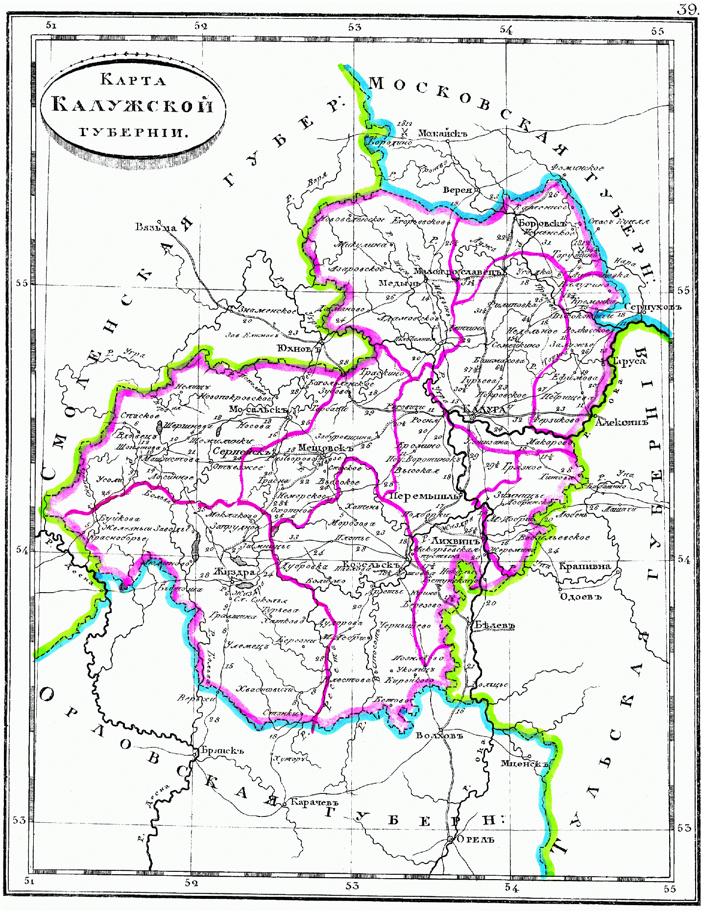 Карта Калужской губернии, 1835